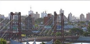 Panorámica ciudad de Santa Fe, Argentina